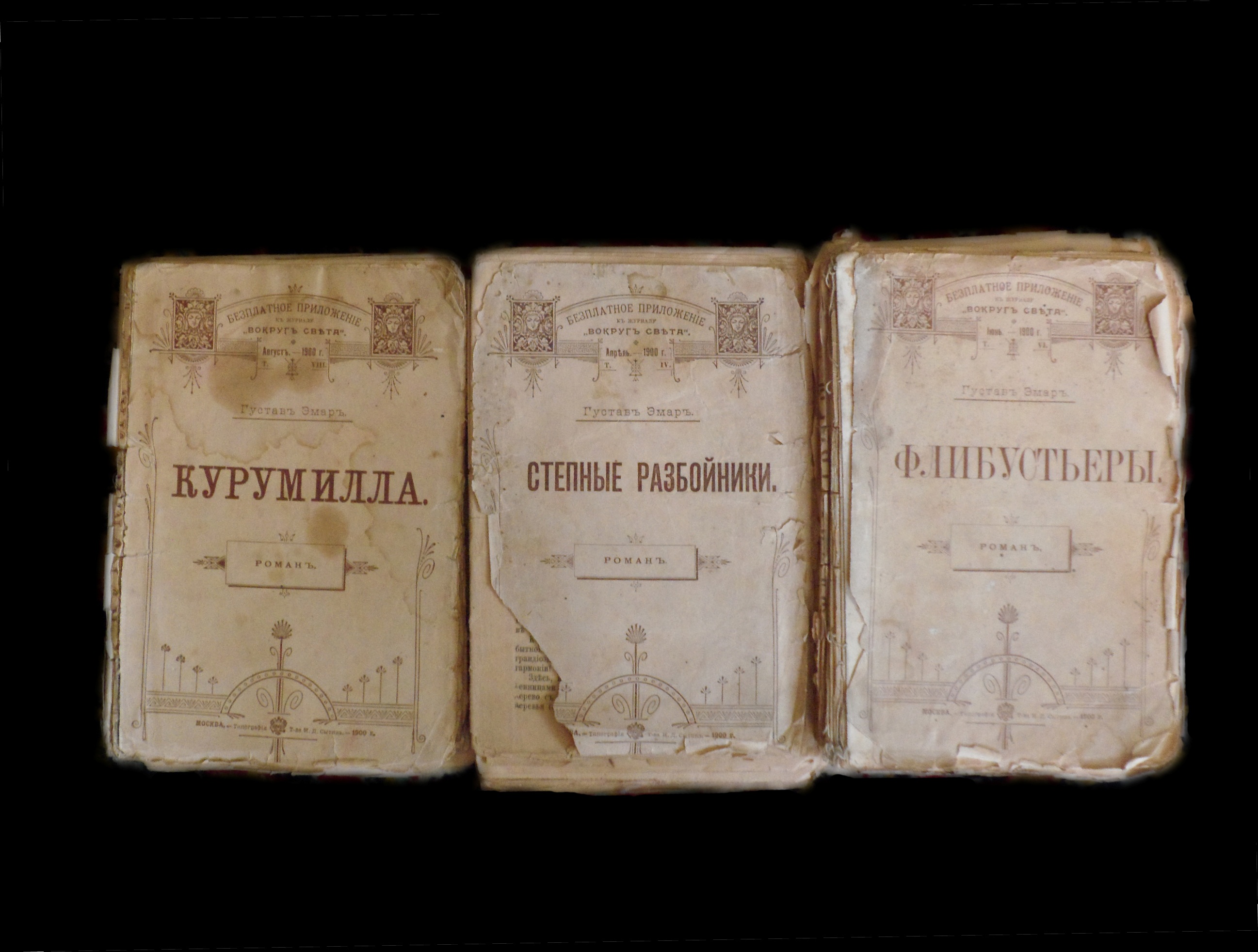 Приложение к Журналу Вокруг Света за 1990 год. Романы Густава Эмара - Курмилла, Степные разбойники и Флибутьеры.